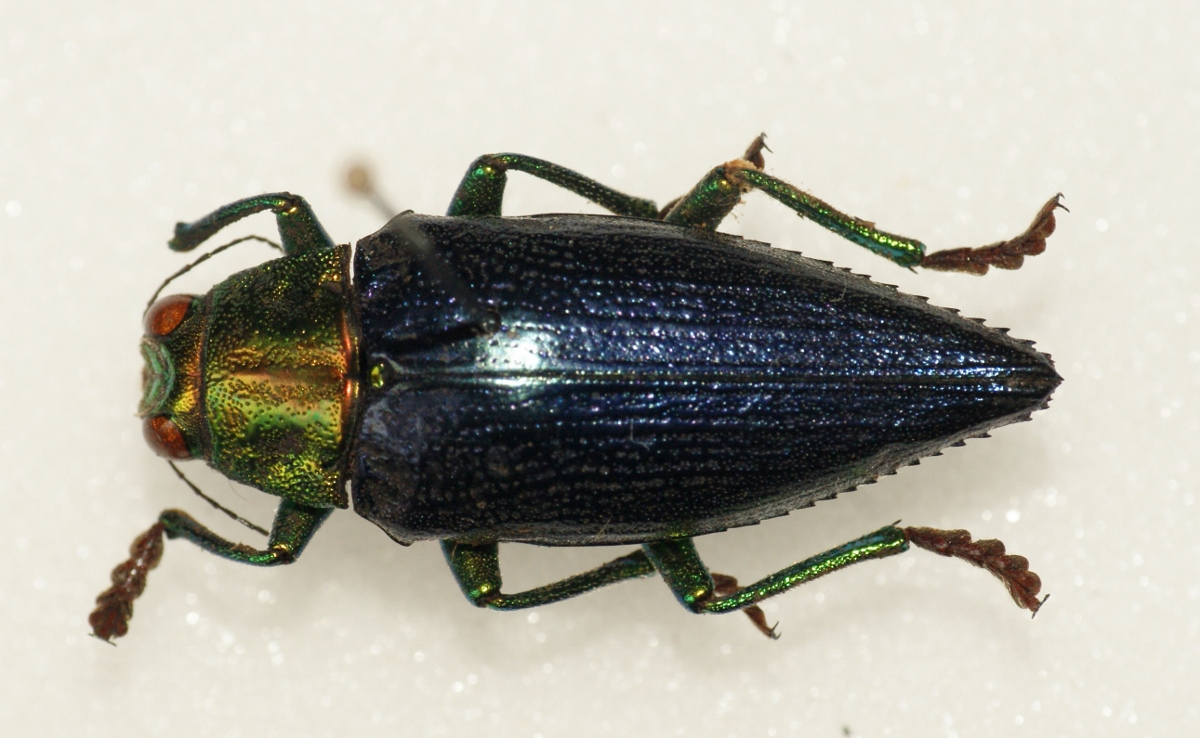 Buprestidae - In collection